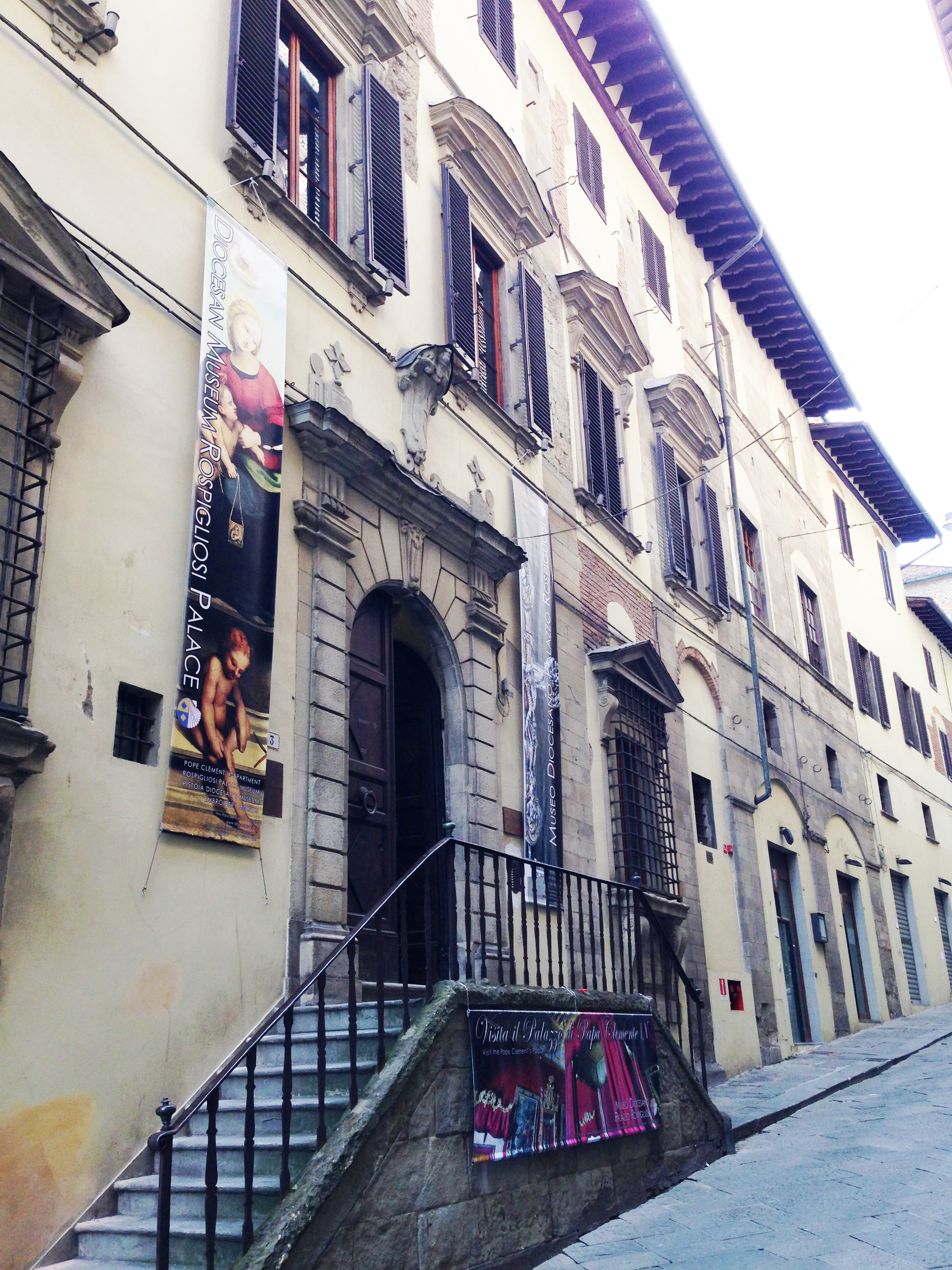 Nella Ripa del Sale, lo sdrucciolo che separa la Cattedrale dal Palazzo del Comune, sul lato della chiesa, si trova Palazzo Rospigliosi; il palazzo, nacque alla metà del XVI secolo per volontà di Giovan Battista Rospigliosi, detto Bati, che accorpò vari fabbricati preesistenti, nell'area della prima cinta muraria cittadina. L'elemento architettonico più significativo della facciata, perfettamente in linea con i modelli del tardo manierismo fiorentino, è costituito dal portale d'ingresso che, sormontato dallo stemma dei Rospigliosi, si apre sulla via con un'elegante scala a doppia rampa.